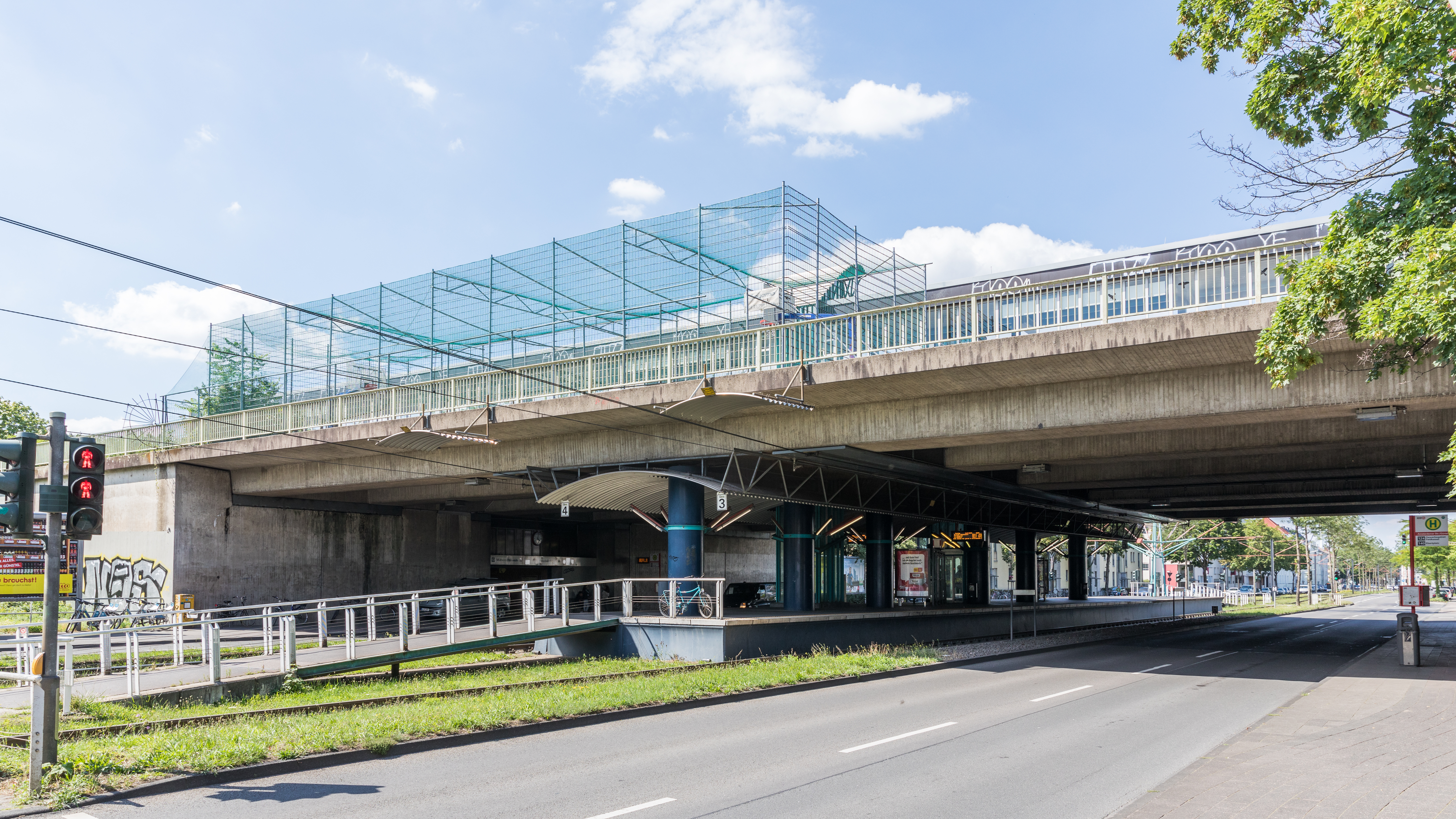 Stadtbahnhaltestelle Amsterdamer Straße/Gürtel, Köln. Ansicht von Süden. Hier kreuzen sich die Stadtbahnliinien 13 (Hochbahn) und 16 (Straßenebene). Auf Hochbahnebene vorgelagert ist eine Vorleistung für die Verlängerung des Gürtels. Nutzung durch einen Basketballplatz